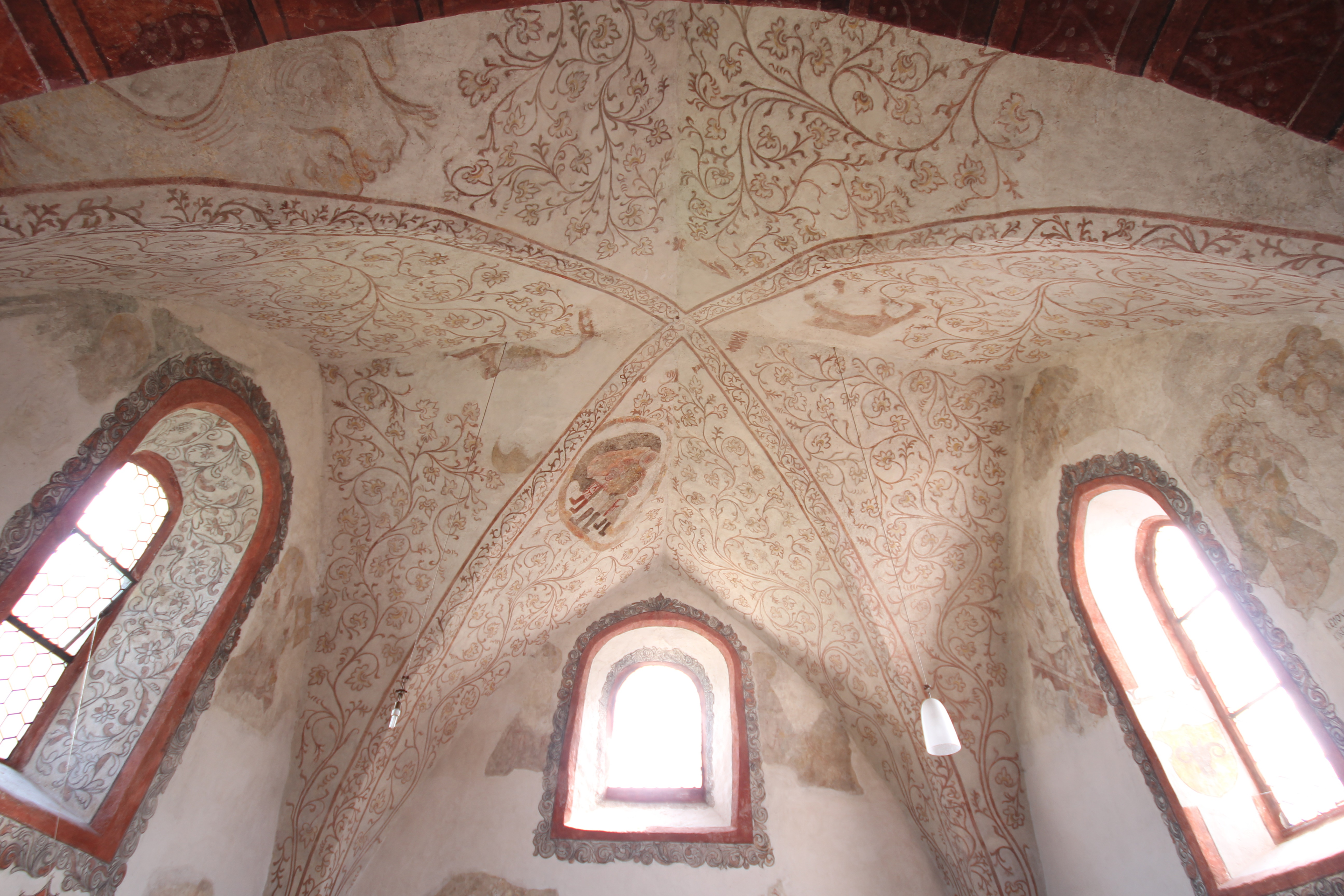 Blick zur Decke des Chorraums der Evangelischen Kirche zu Hohenahr-Erda